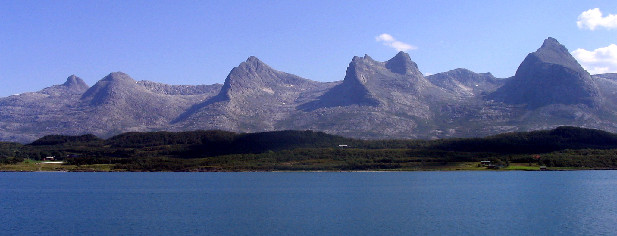 Norway [2004]